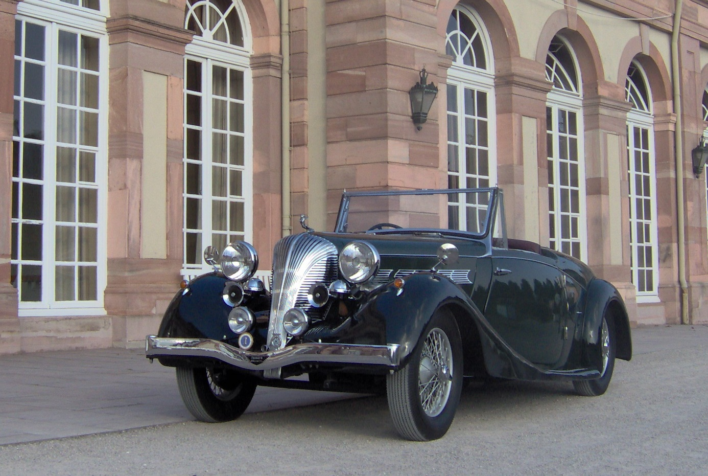 Triumph Dolomite Roadster. Baujahr 1938. Aufgenommen 2006 im Schloss Schwetzingen bei einer Oldtimer Veranstaltung.